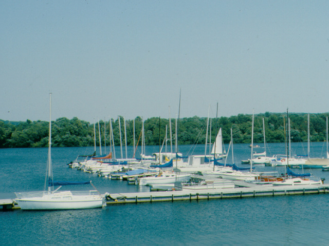 Marina at Codorus State Park